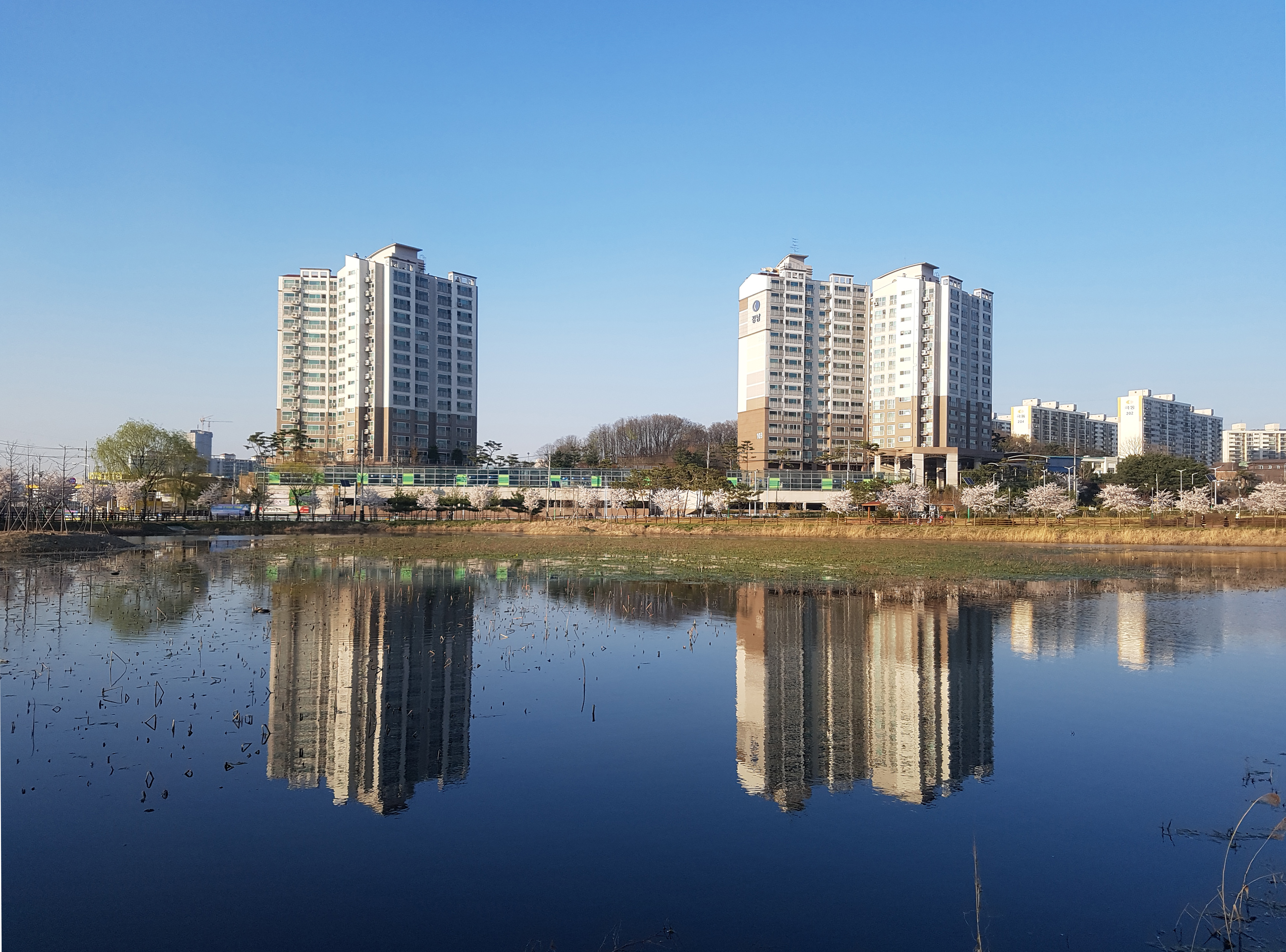 청수지구개발사업 이전에는 청수동 저수지였다.